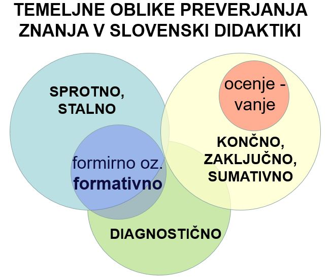 Oblike preverjanja znanja v slovenski didaktiki